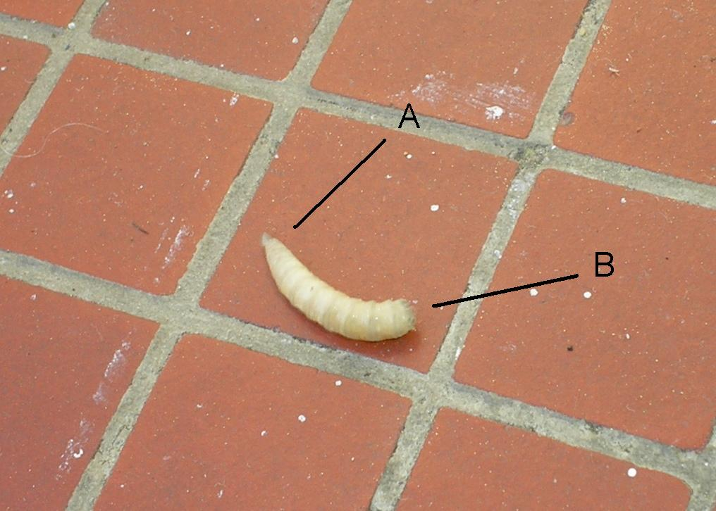 Asticot